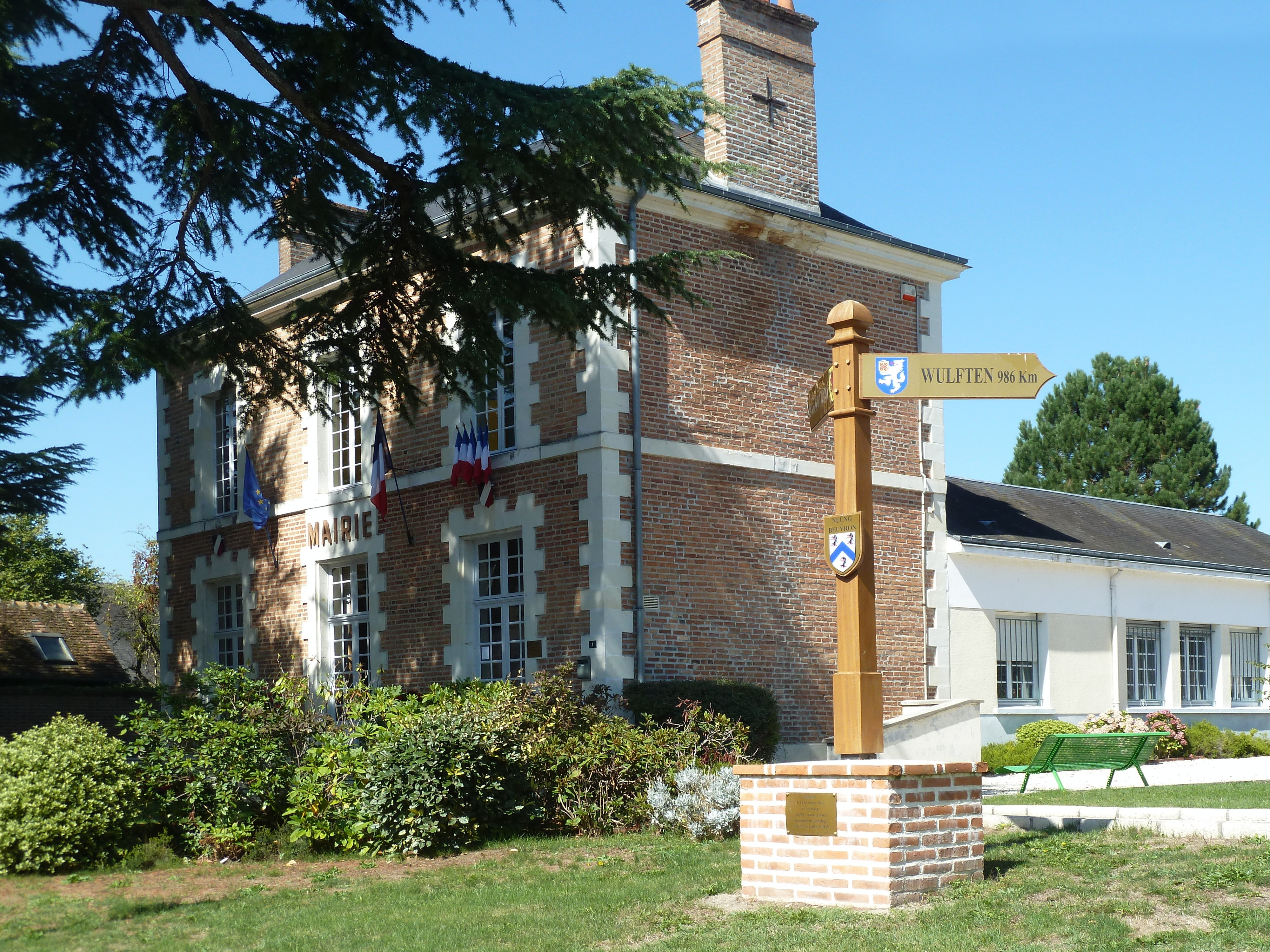 La mairie de Neung-sur-Beuvron, Loir-et-Cher, France